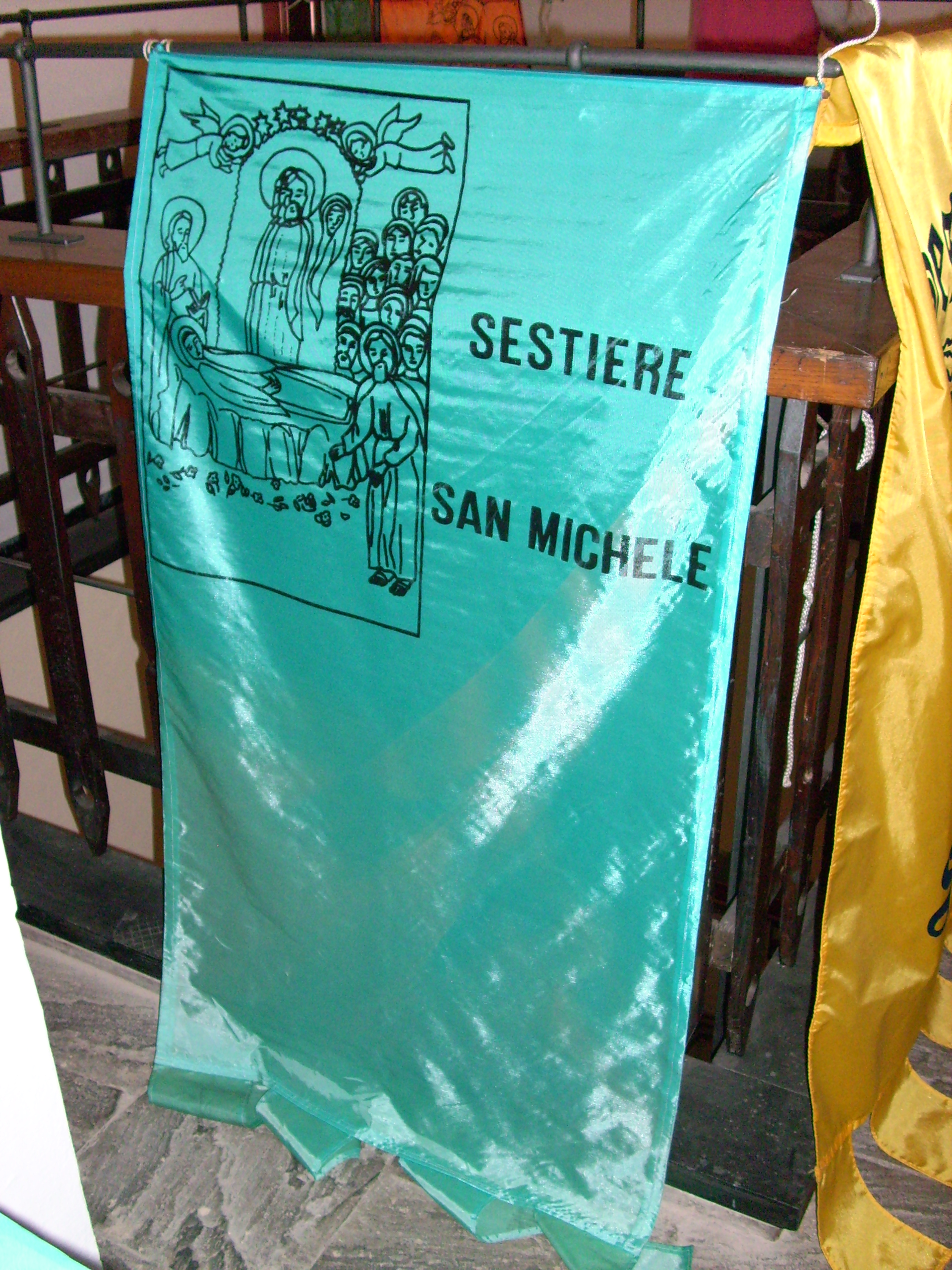 Bandiera del Sestiere San Michele di Rapallo, Liguria, Italia